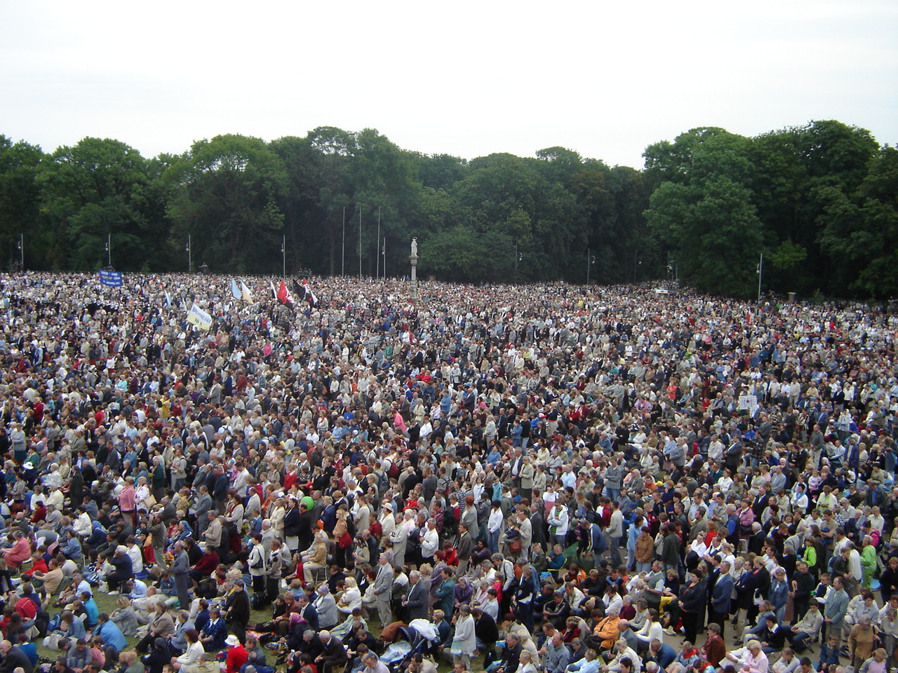 Uczestnicy uroczystości święta Wniebowzięcia Najświętszej Maryi Panny na Jasnej Górze.